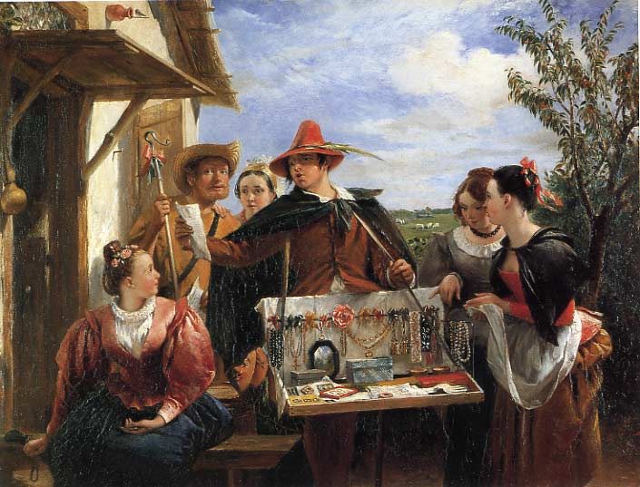 Autolycus